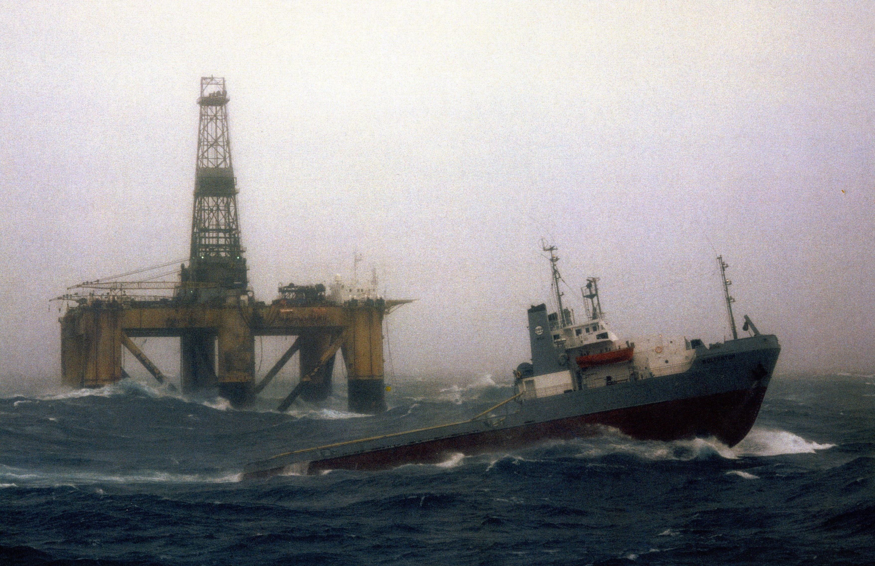 Foto: 1980 Neufundland, Bohrturmversorger in schwerer See